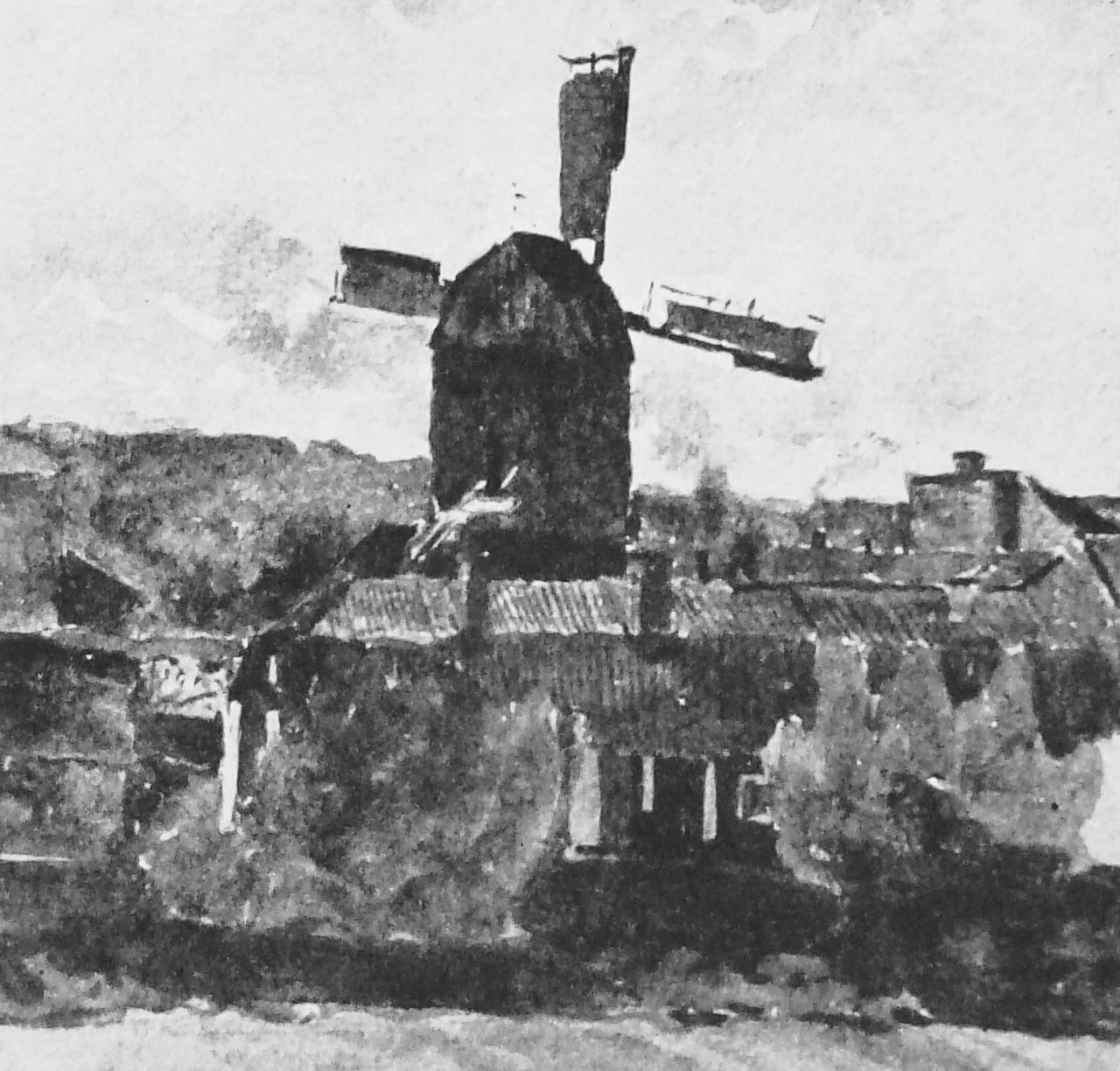 Kvarnen "Lilla Eva", akvarell av A.T. Gellerstedt 22/5 1878